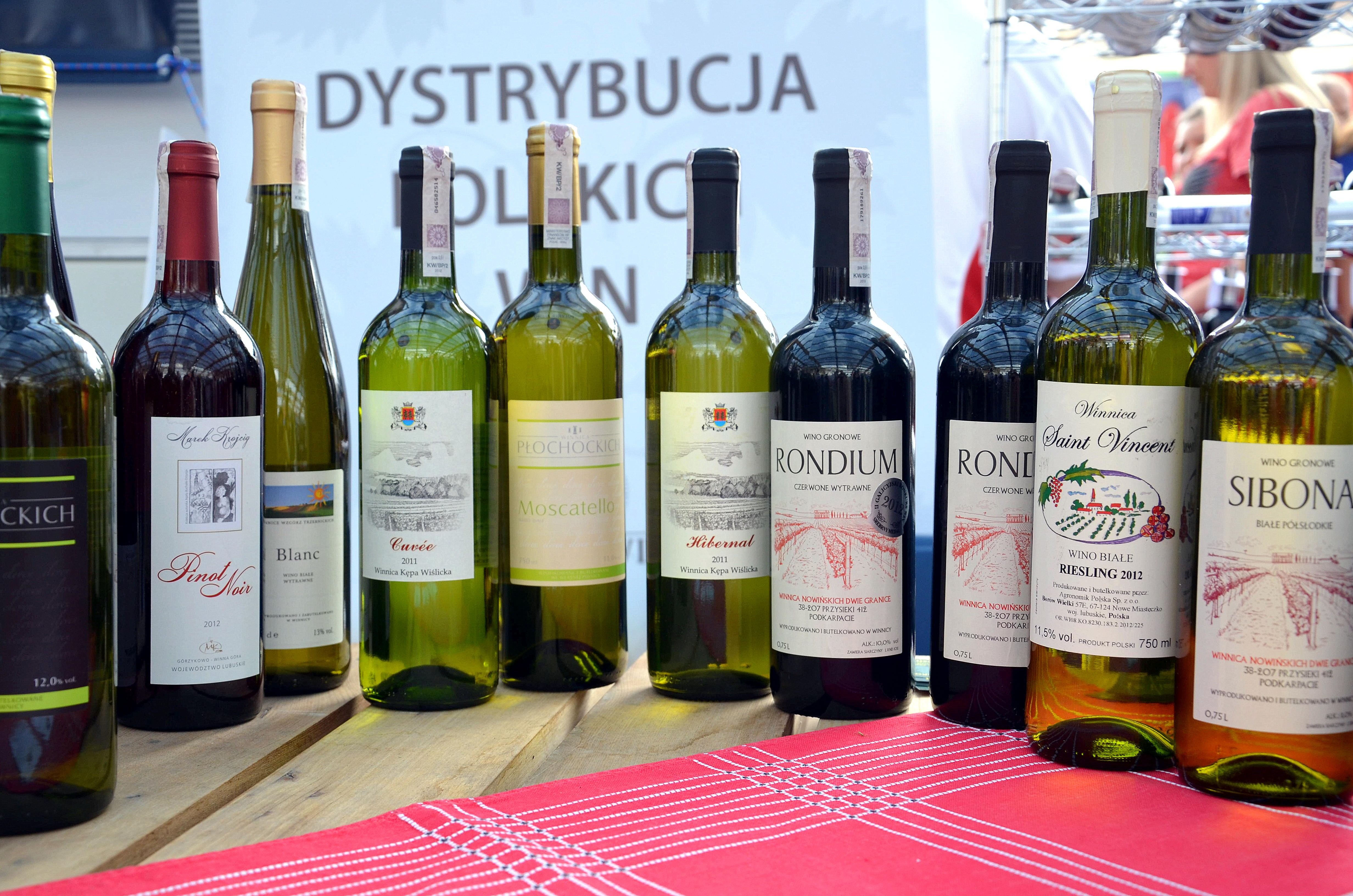 verschiedener Weine aus Sud-Polen und Schlesien